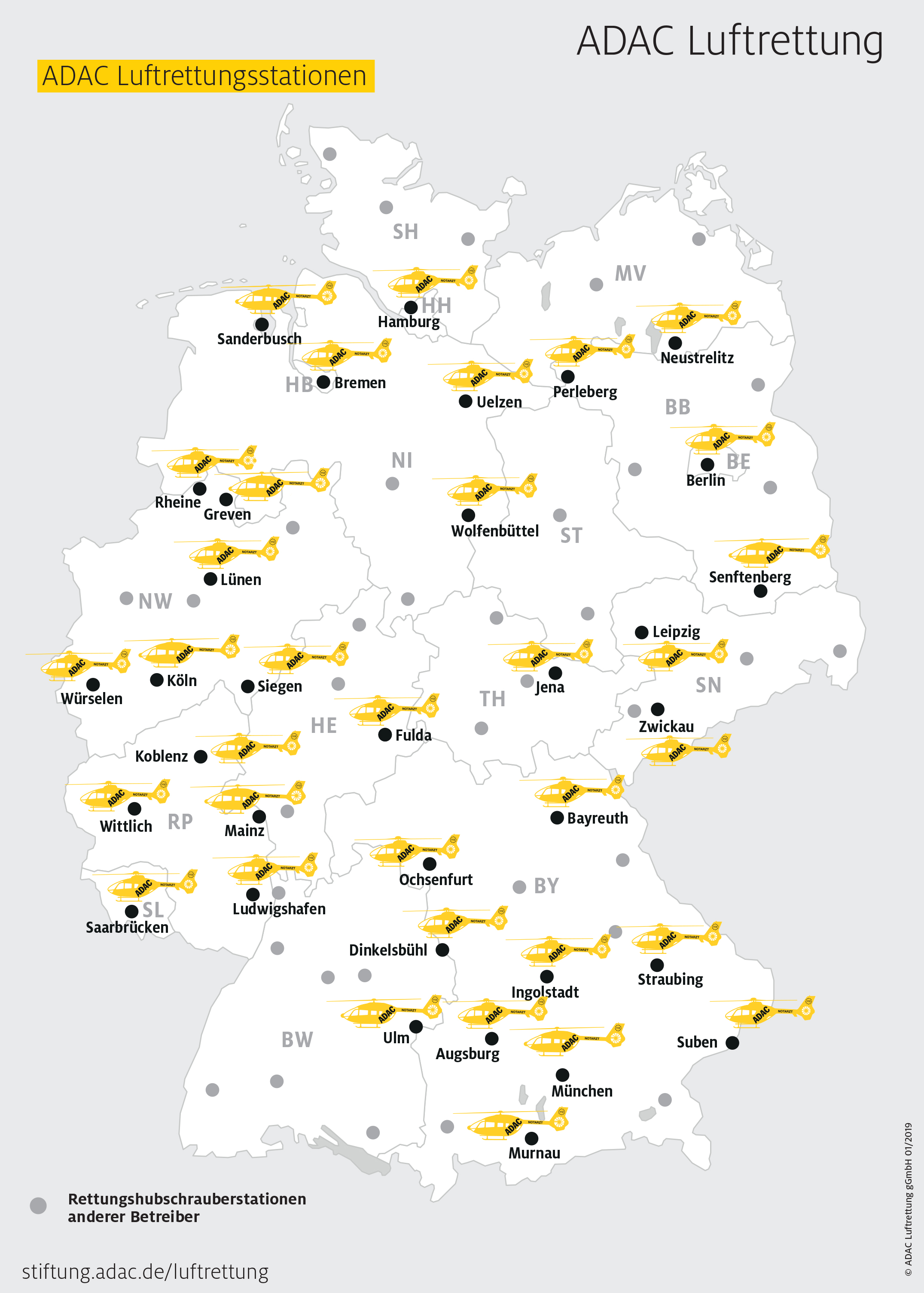 Standortkarte der ADAC Luftrettung. Modifiziert von File:Standortkarte.jpg